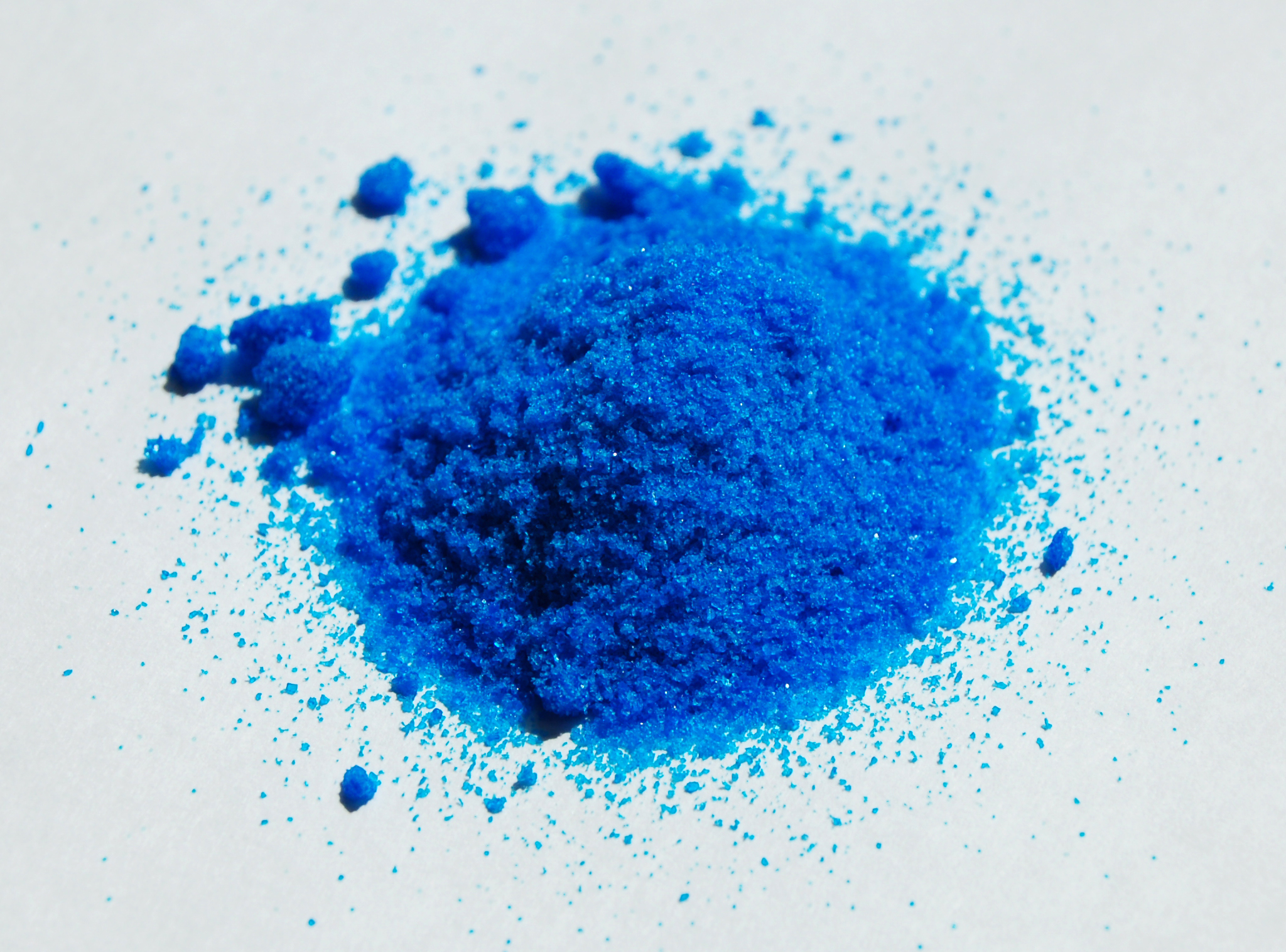 Copper(II) nitrate trihydrate sample.jpg